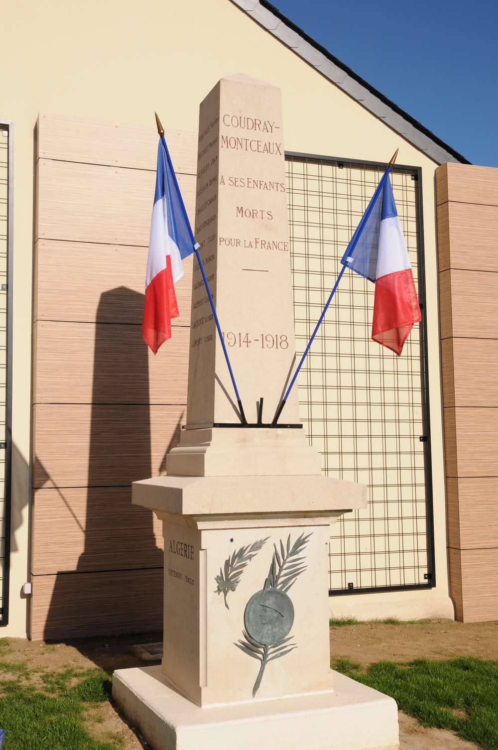 Monuments aux morts restauré du Coudray-Montceaux